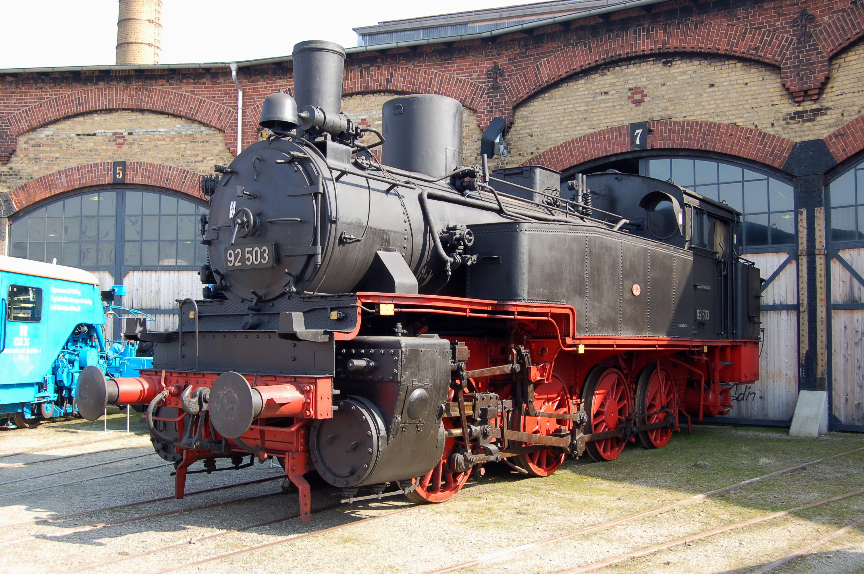 Dampflokomotive 92 503 des Verkehrsmuseums Dresden im Bahnbetriebswerk Dresden-Altstadt.